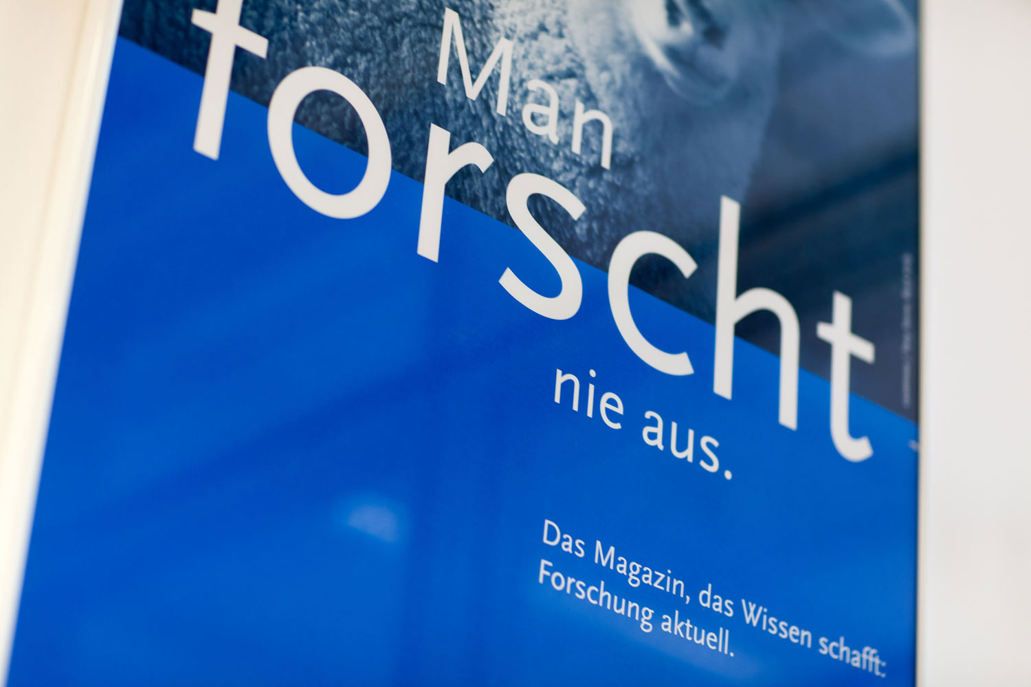 Blick von schräg unten auf das Poster der Deutschlandfunksendung "Forschung Aktuell". Der Claim lautet: Man forscht nie aus.